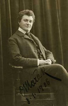 Otakar Mařák (1872 - 1939), Český operní pěvec, tenorista..